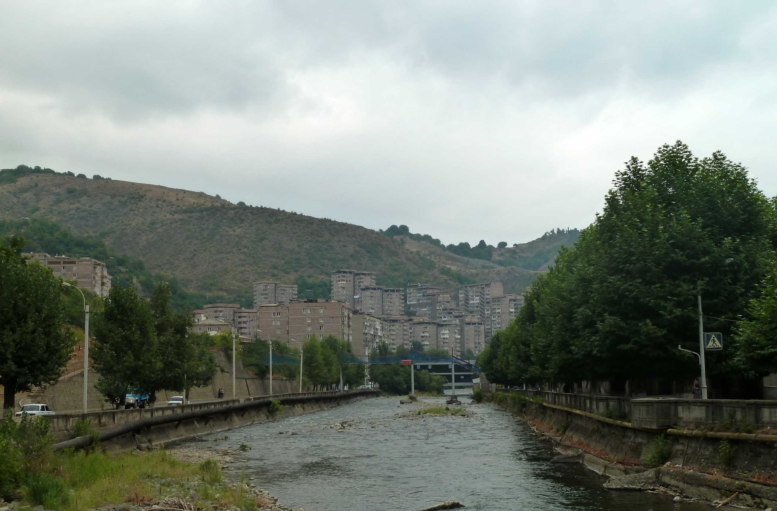 Капан